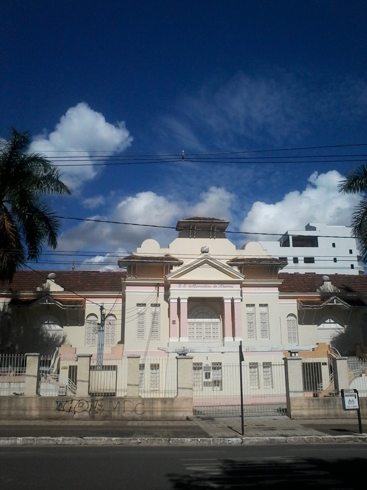 Escola Estadual Marcolino de Barros, em Patos de Minas